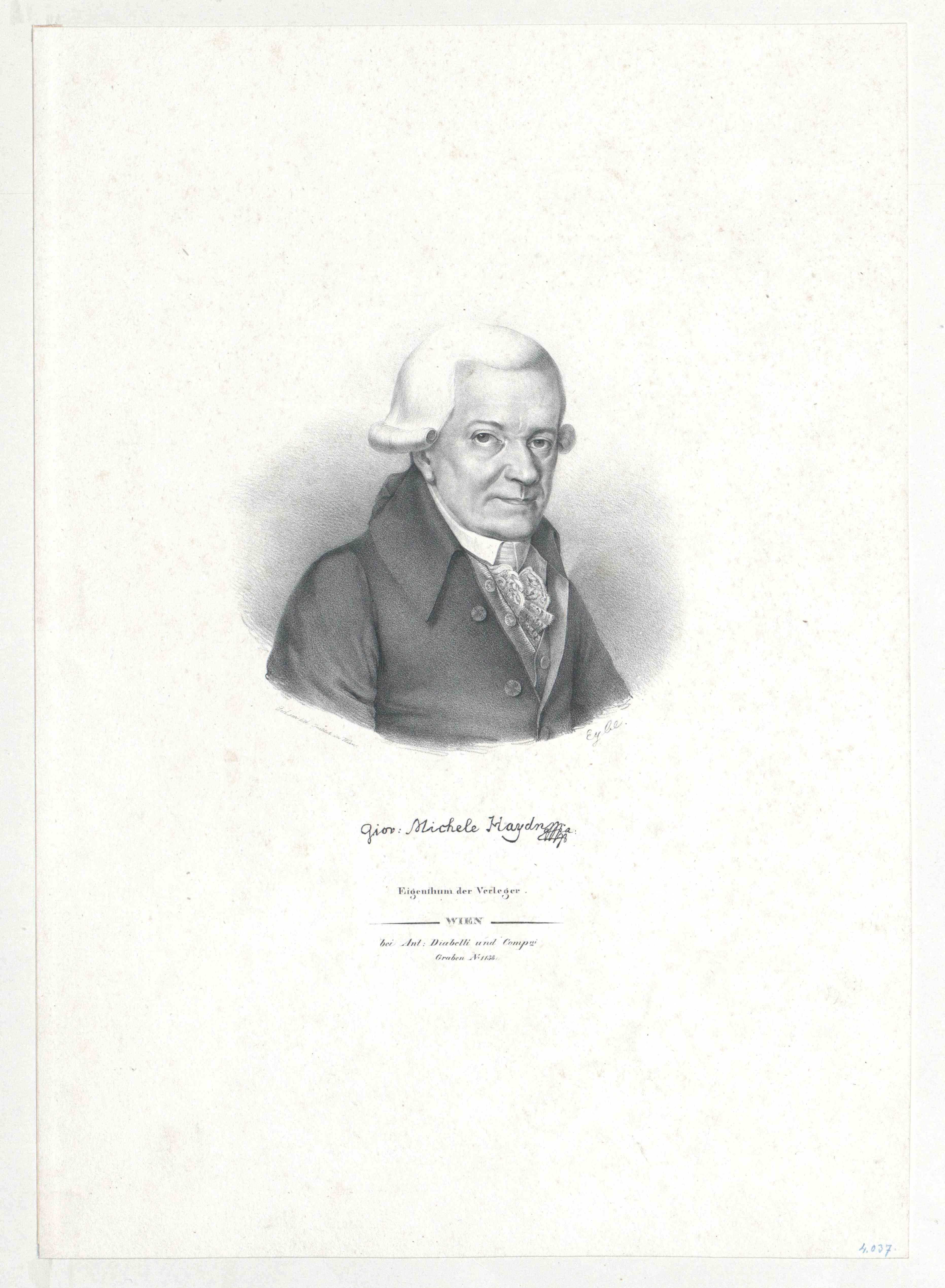 Michael Haydn (1737-1806), österreichischer Komponist. Lithographie von Franz Eybl, s. a.